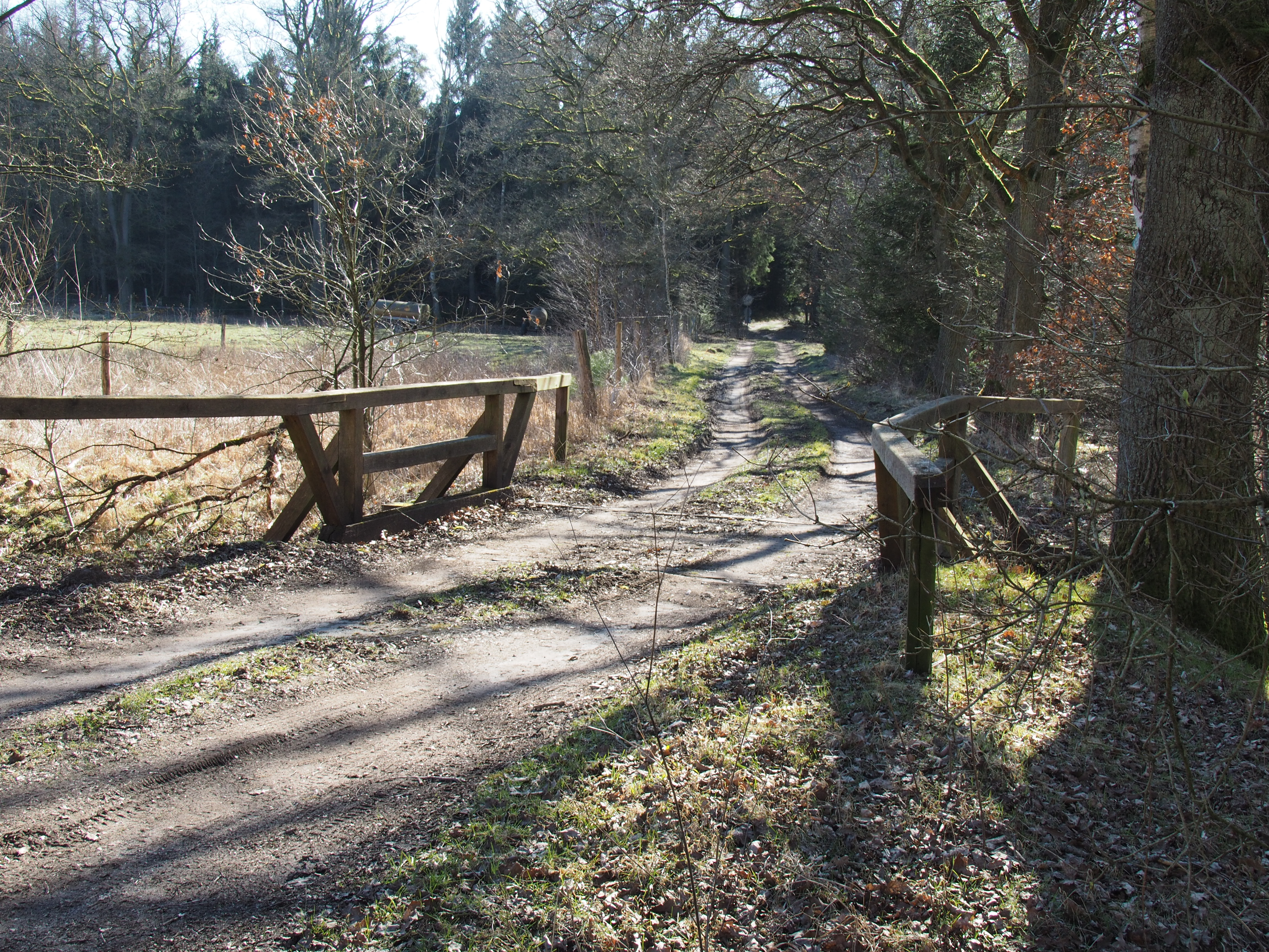 Weg zum ehemaligen KZ-Außenlager Unterlüß in Altensothrieth, über die Brücke der Sothrieth